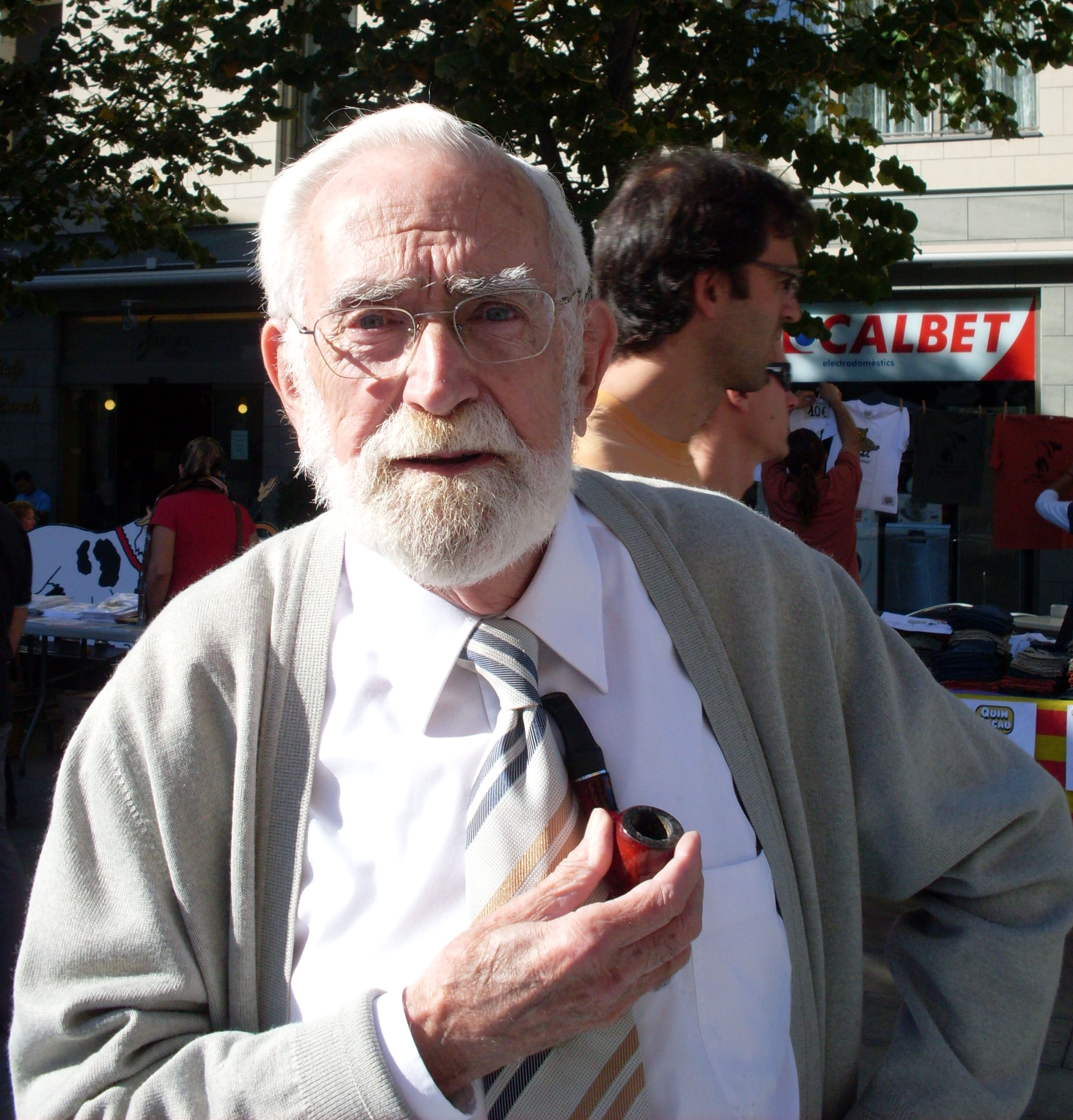 Ramon Folch i Camarasa, autor i traductor català. Director de la Fundació Folch i Torres.